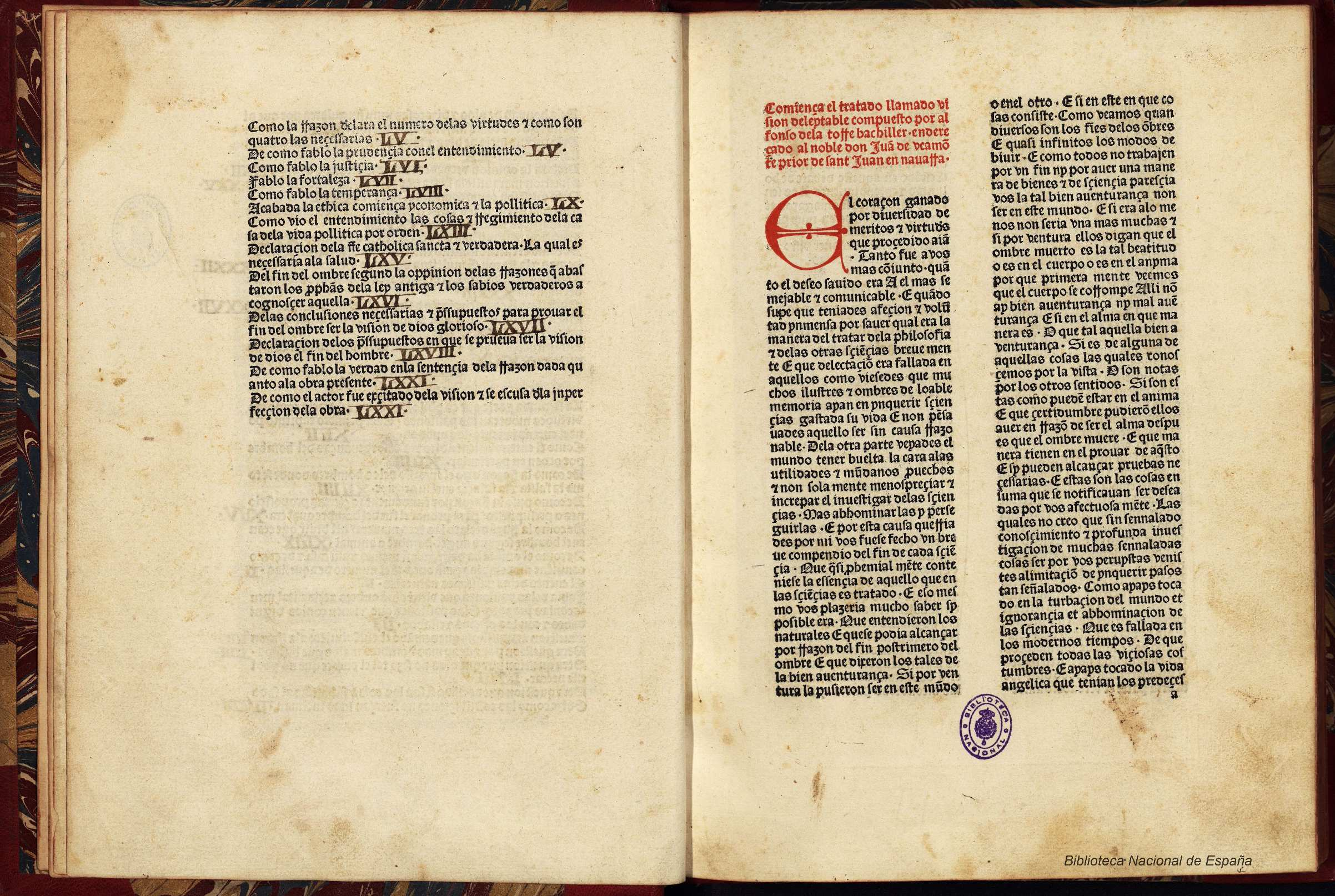 Visión deleitable Autor: Torre, Alfonso de la (m. 1460) Fecha: 1485 Datos de edición: [Burgos] [Fadrique de Basilea] (Biel de Basilea, Fadrique)